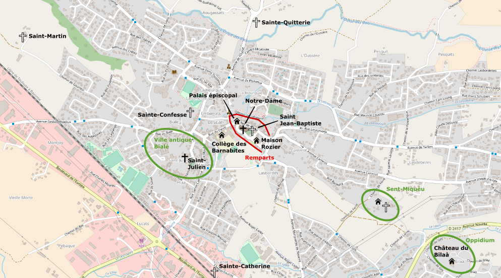 Carte représentant les principaux lieux patrimoniaux de Lescar, incluant les principaux foyers d'occupation antique, les églises aujourd'hui disparues ainsi que l'ancien palais épiscopal de la ville.